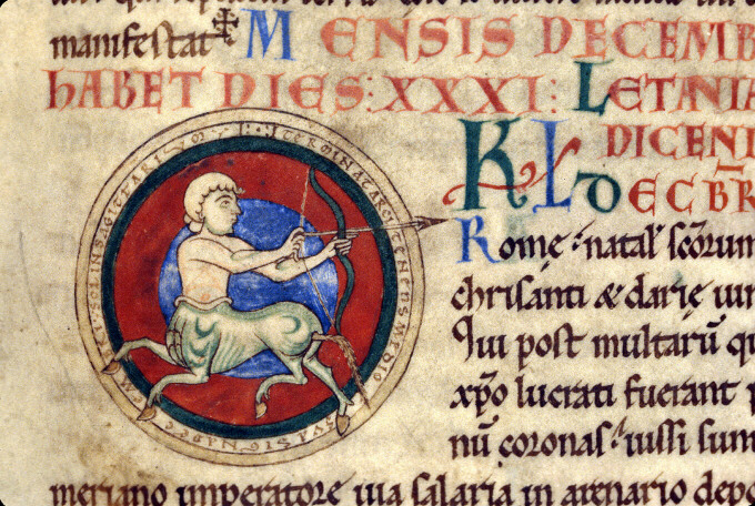 Martyrologium / Usuardus Dijon - BM - ms. 0634 - f. 057